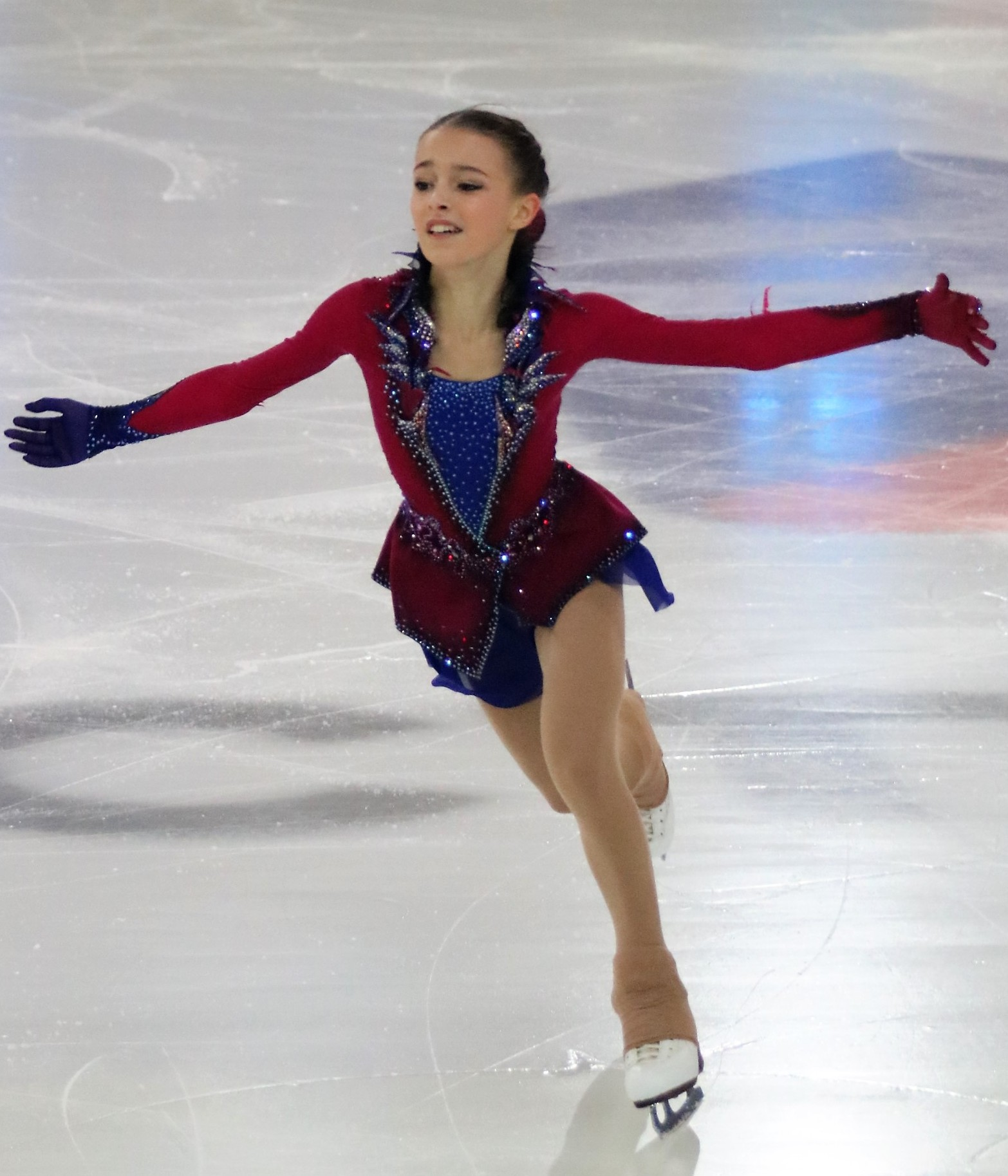 Анна Щербакова на чемпионате России по фигурному катанию на коньках 2019